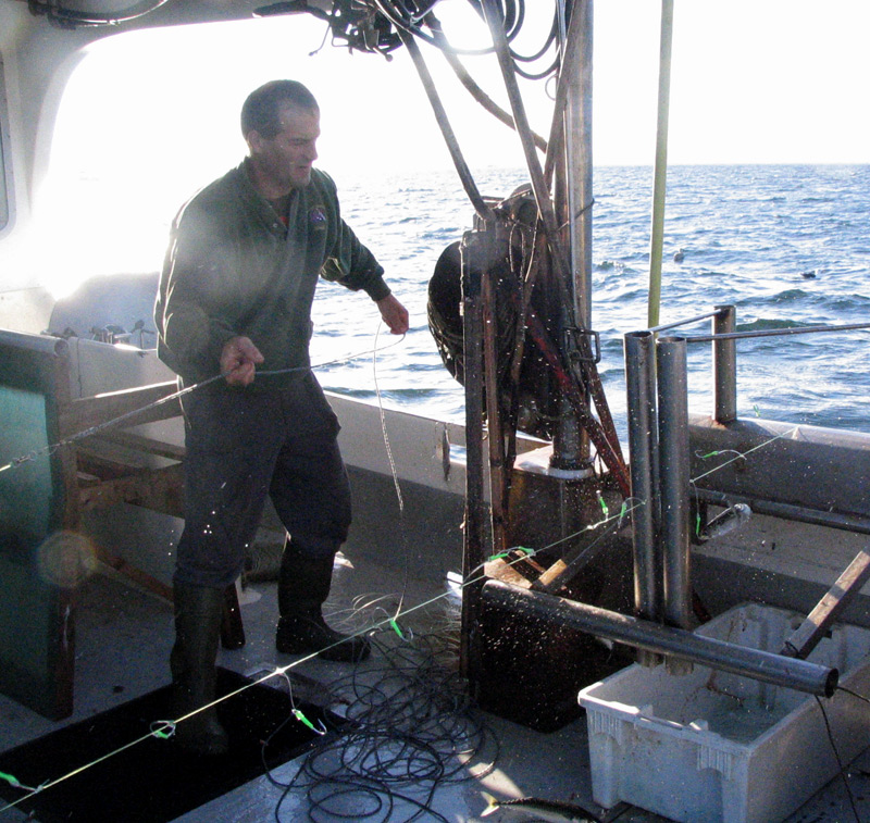 Pêche au maquereau aux Îles-de-la-Madeleine en 2006. Pêcheur: Ghislain Cyr.